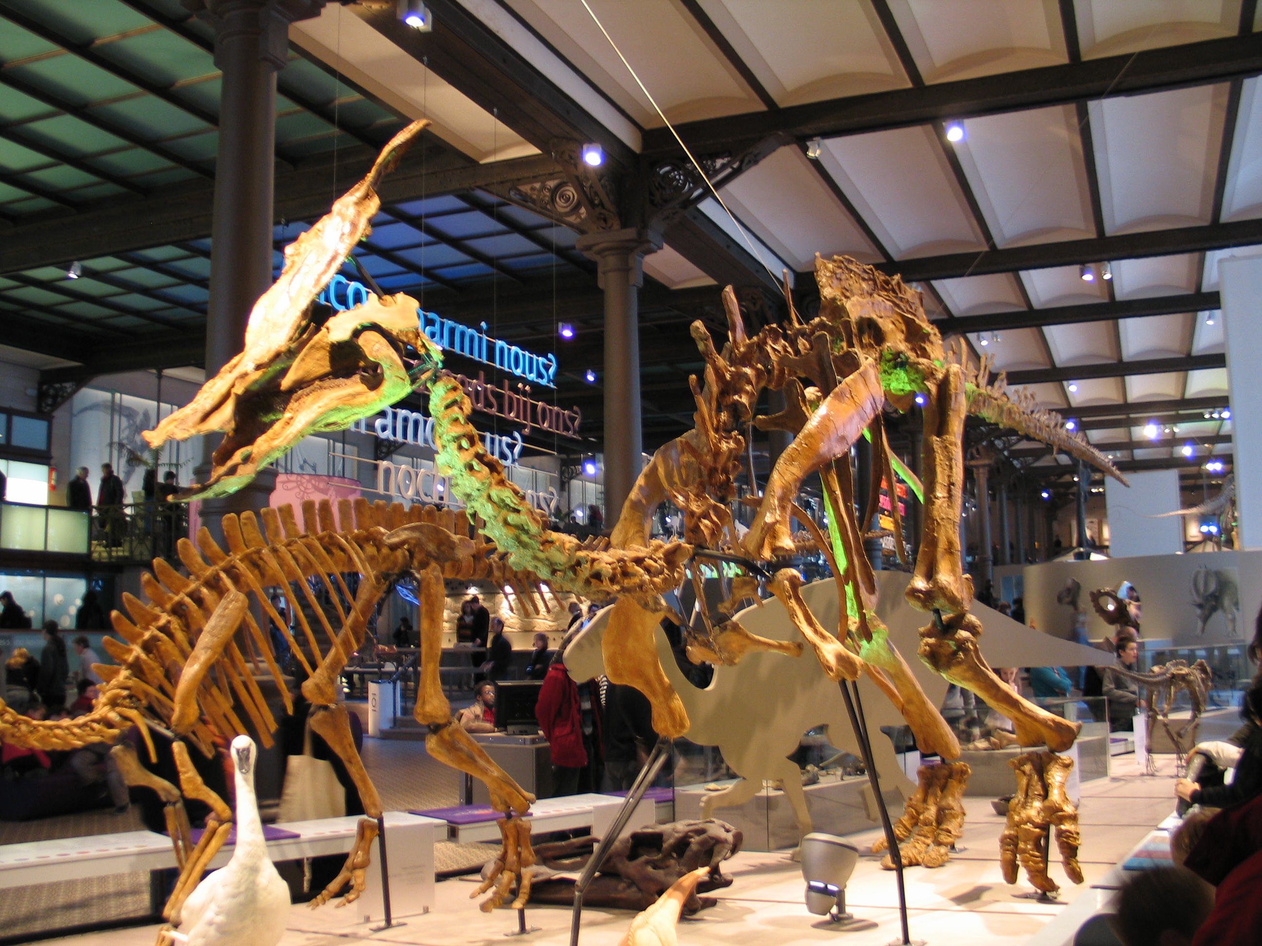 Olorotitan at the Museum voor Natuurwetenschappen in Brussels, Belgium